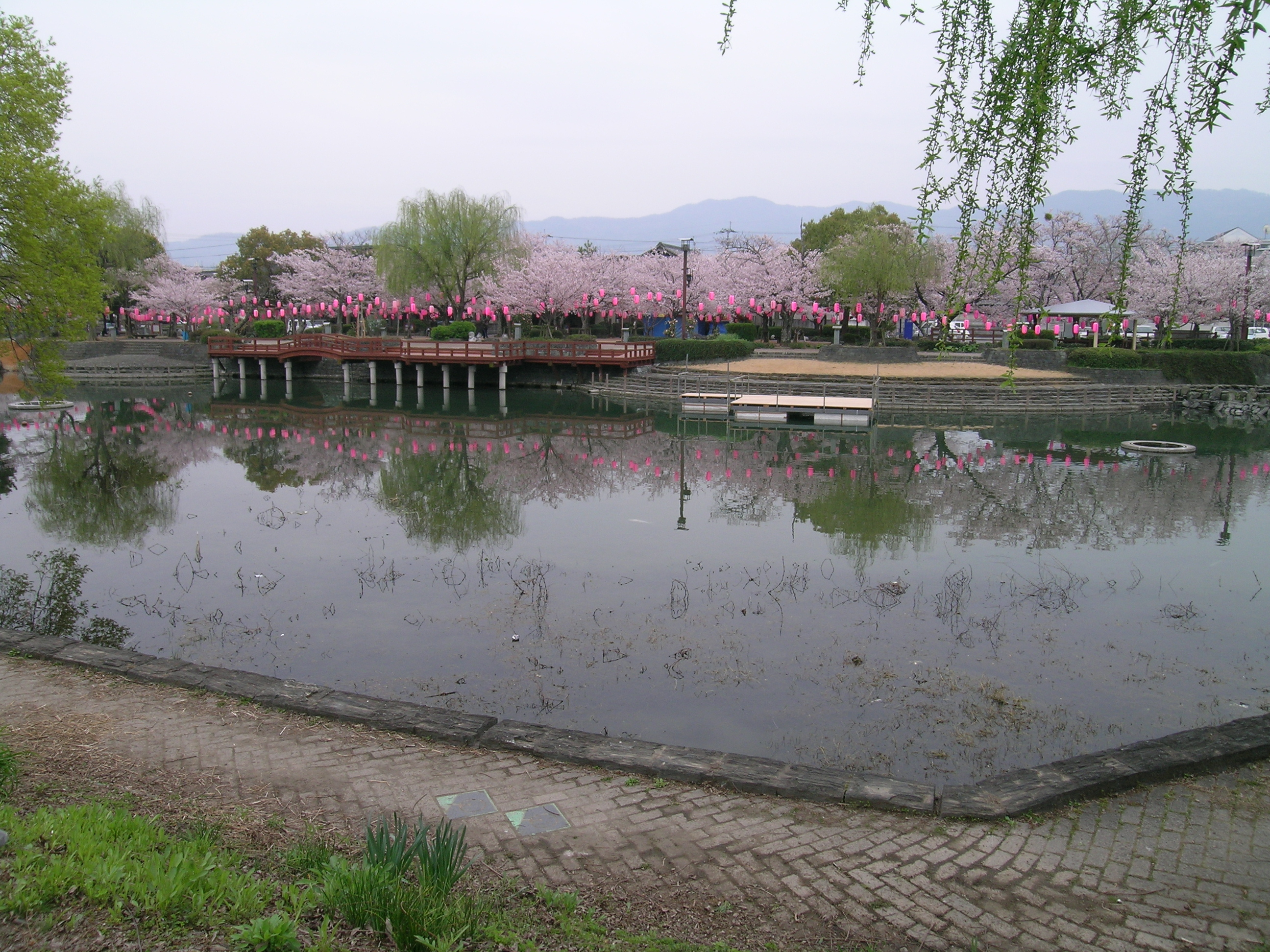 江川の対岸からみた,鴨島公園